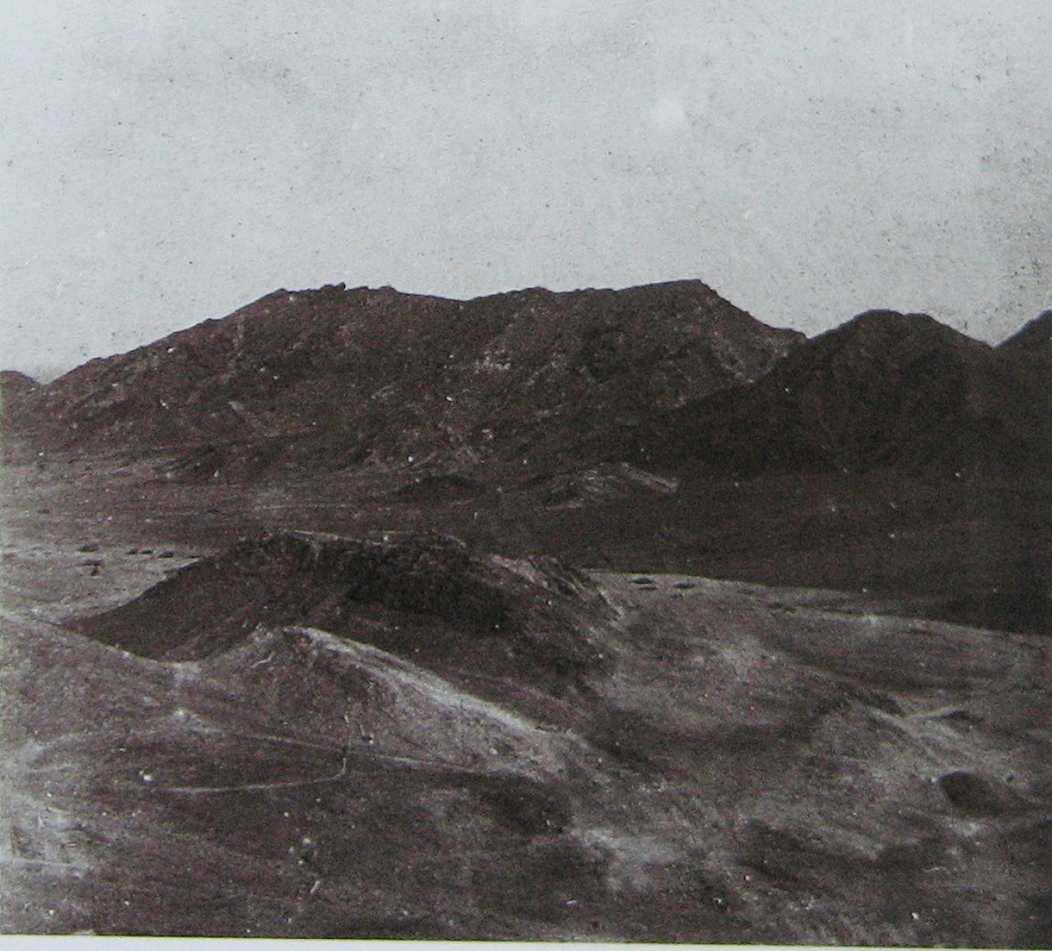 Photographie d'un massif volcanique des environs de la lagune de Cheikh Saïd (Khor Ghorera), Yémen, prise par Henry de Monfreid en janvier 1914. La photo est annotée : "Cheik-Saïd, Montagnes des environs".